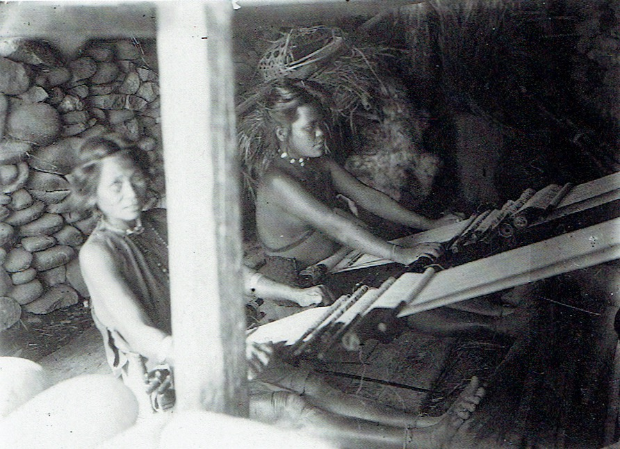 雅美族女性織布。